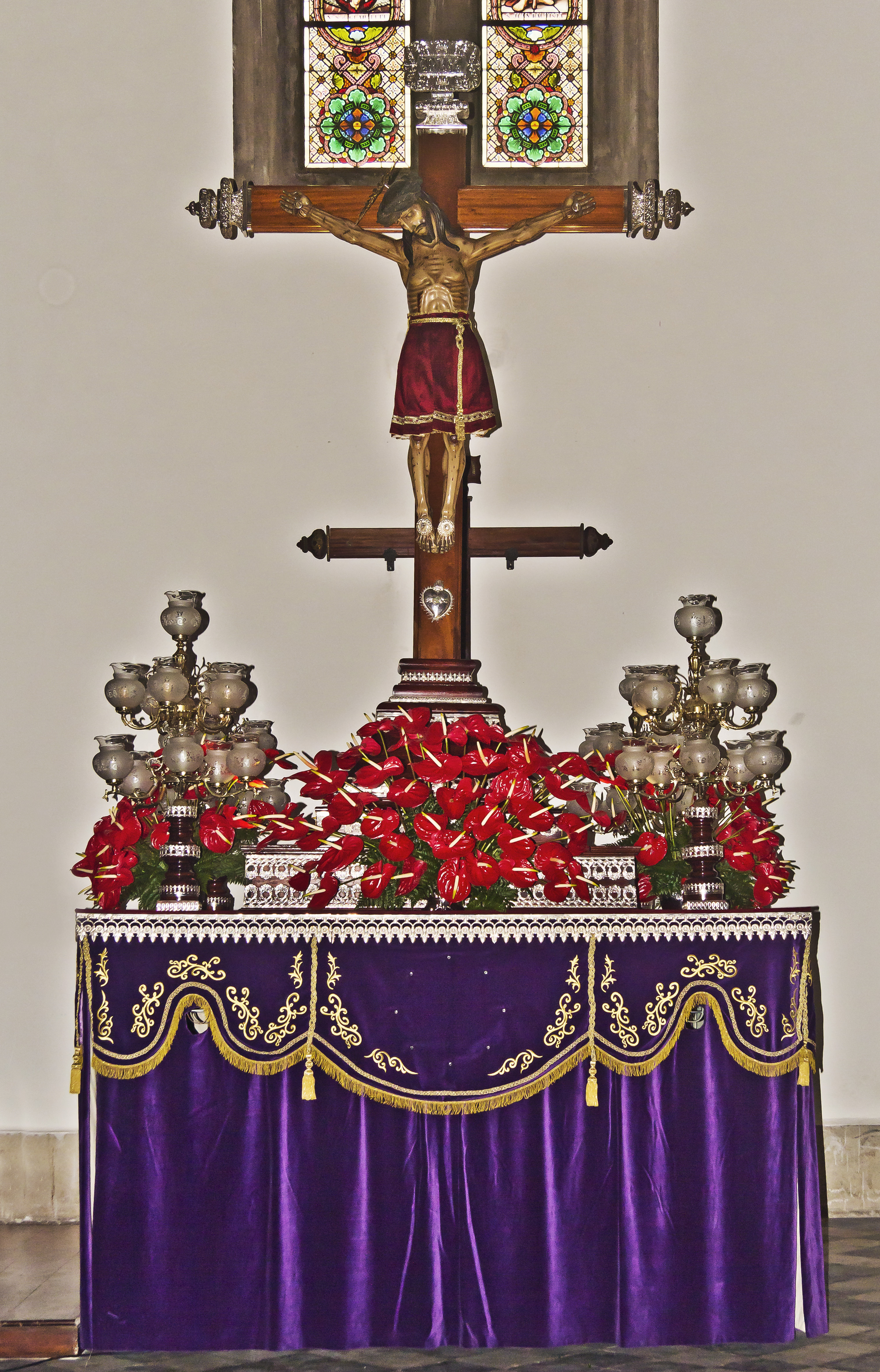 Paso del Santísimo Cristo de Burgos („Cristo de la faldita“)